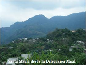 Santa María vista desde la delegación.